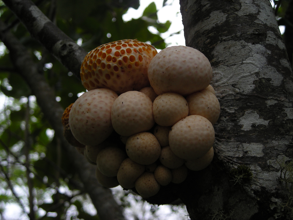 Digüeñes en un arbol (probablemente un Nothofagus). Foto del 11 octubre 2007.